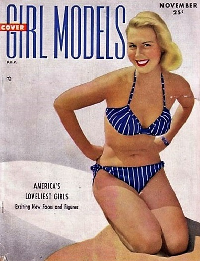 Barbara Freking